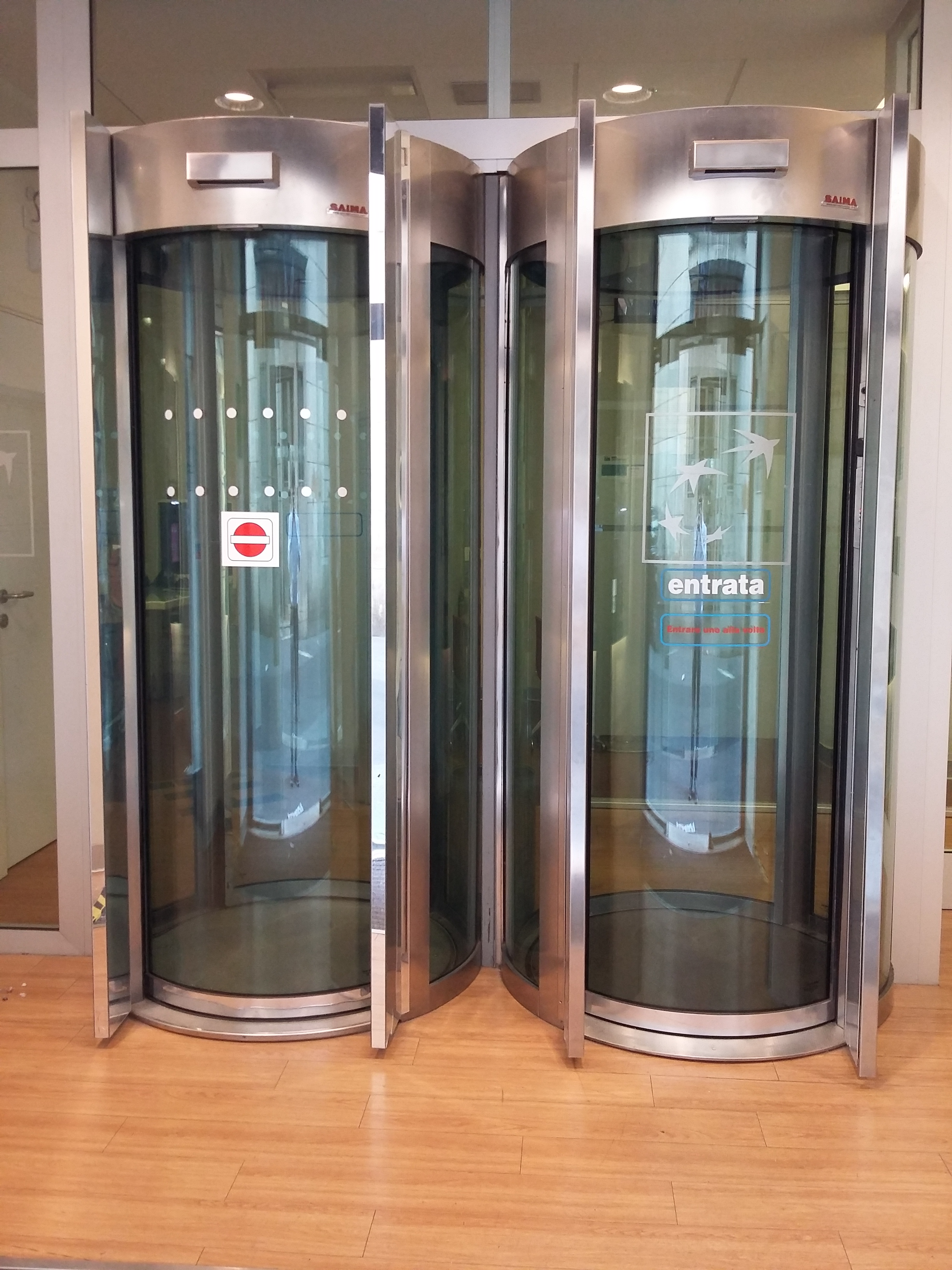 Due bussole con metal detector predisposte al controllo dell'accesso in una banca di Chieti.